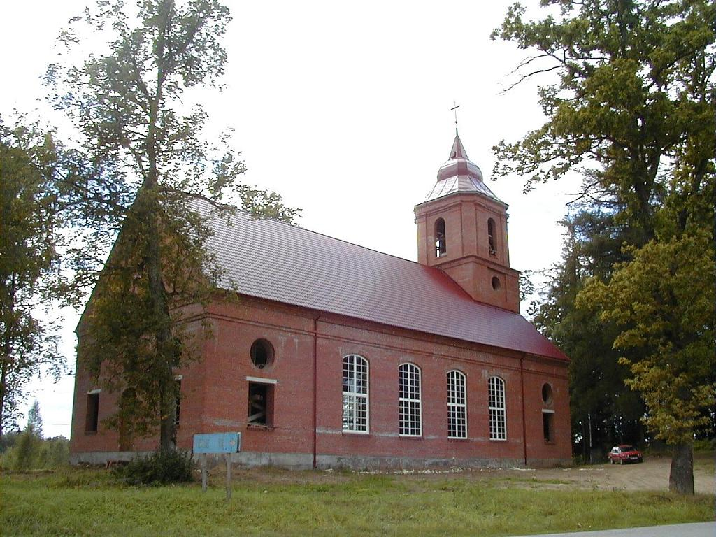 Liezēres evaņģēliski luteriskā baznīca 2001-08-25